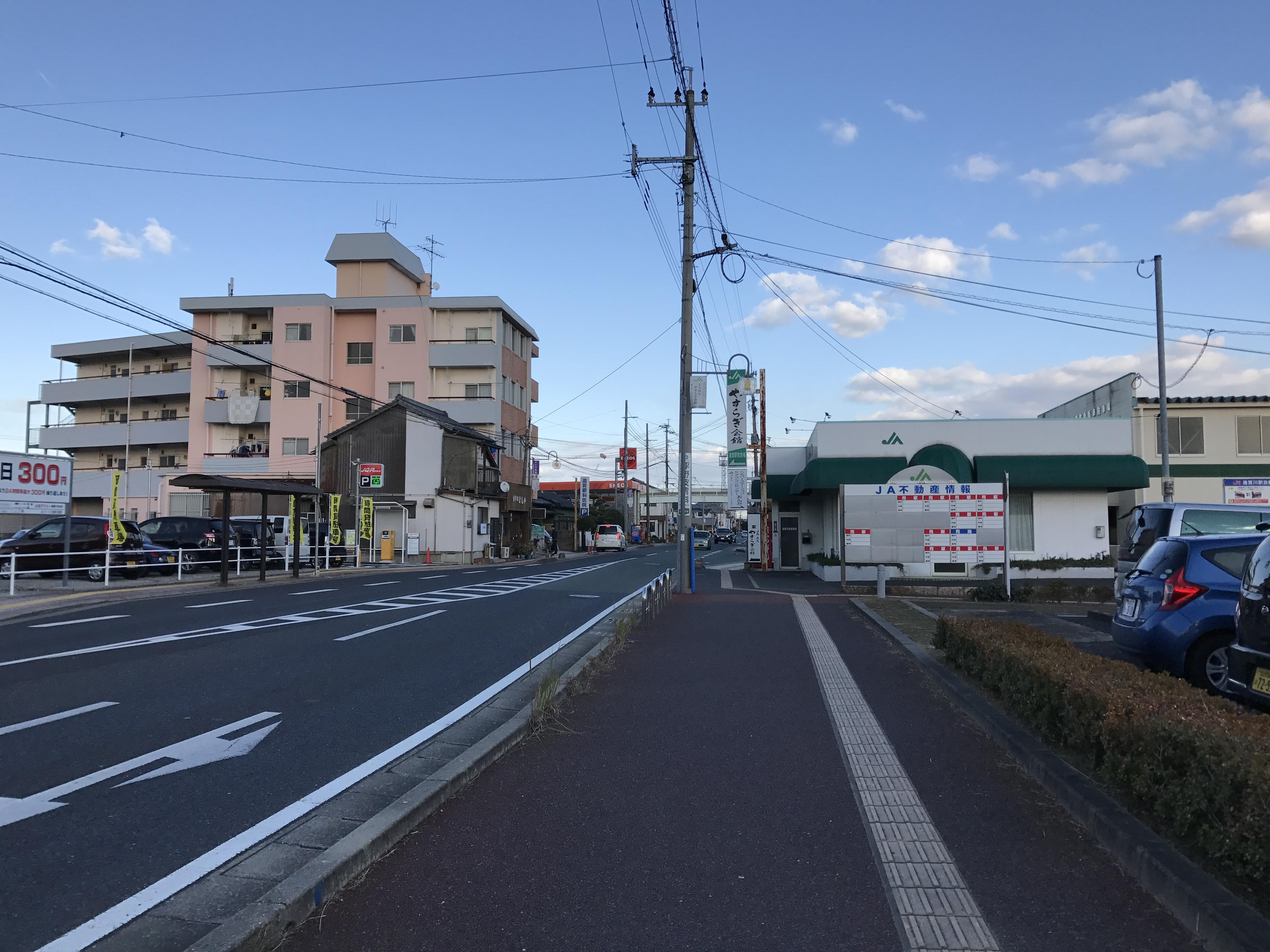 遠賀川駅付近の福岡県道299号